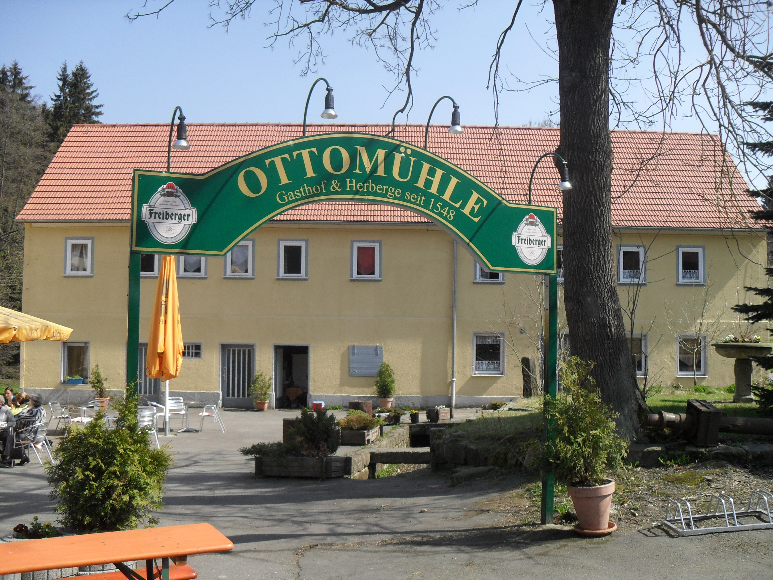 Gästhaus Ottomühle in Bielatal